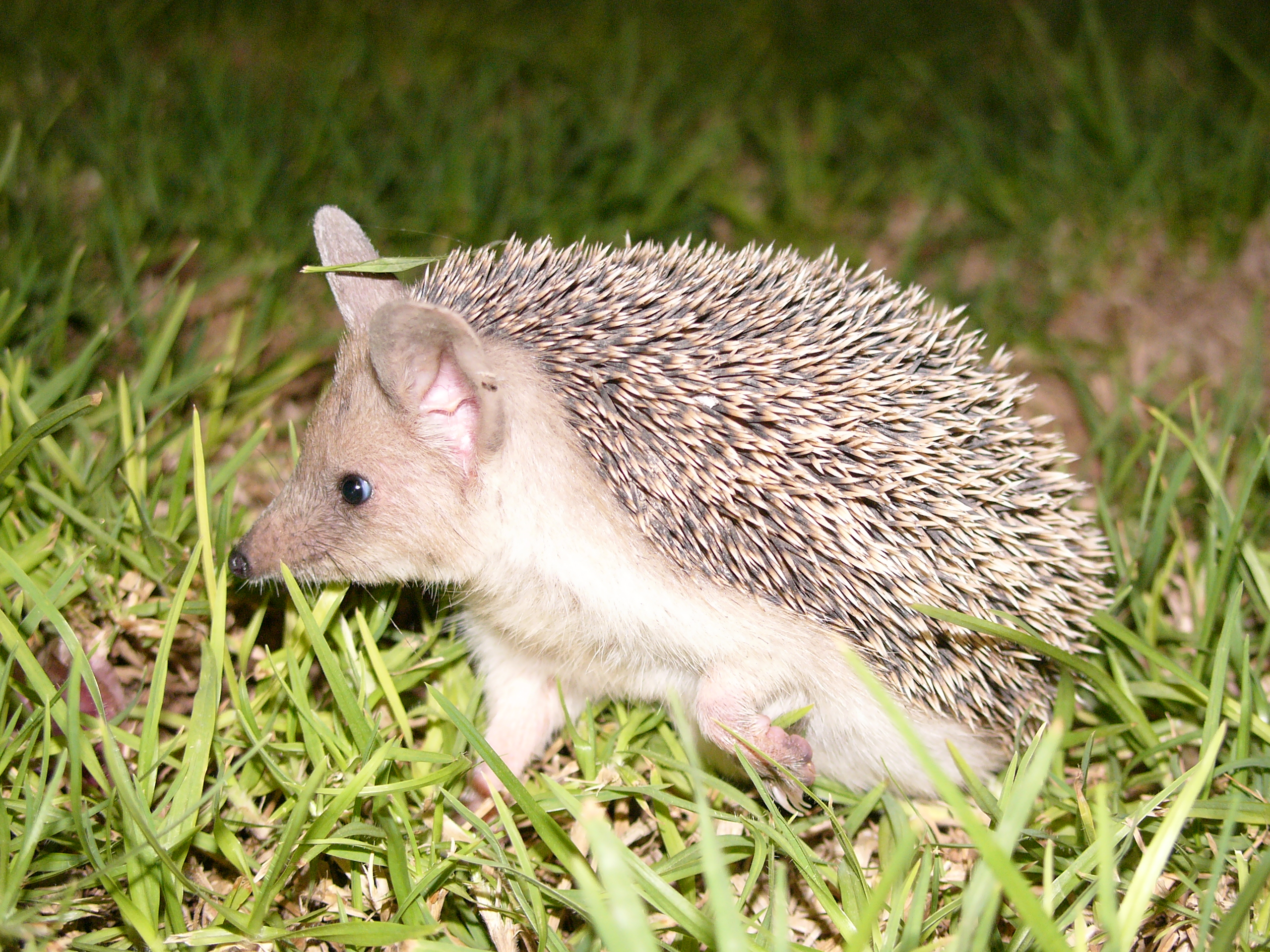 Hedgehog on Cyprus